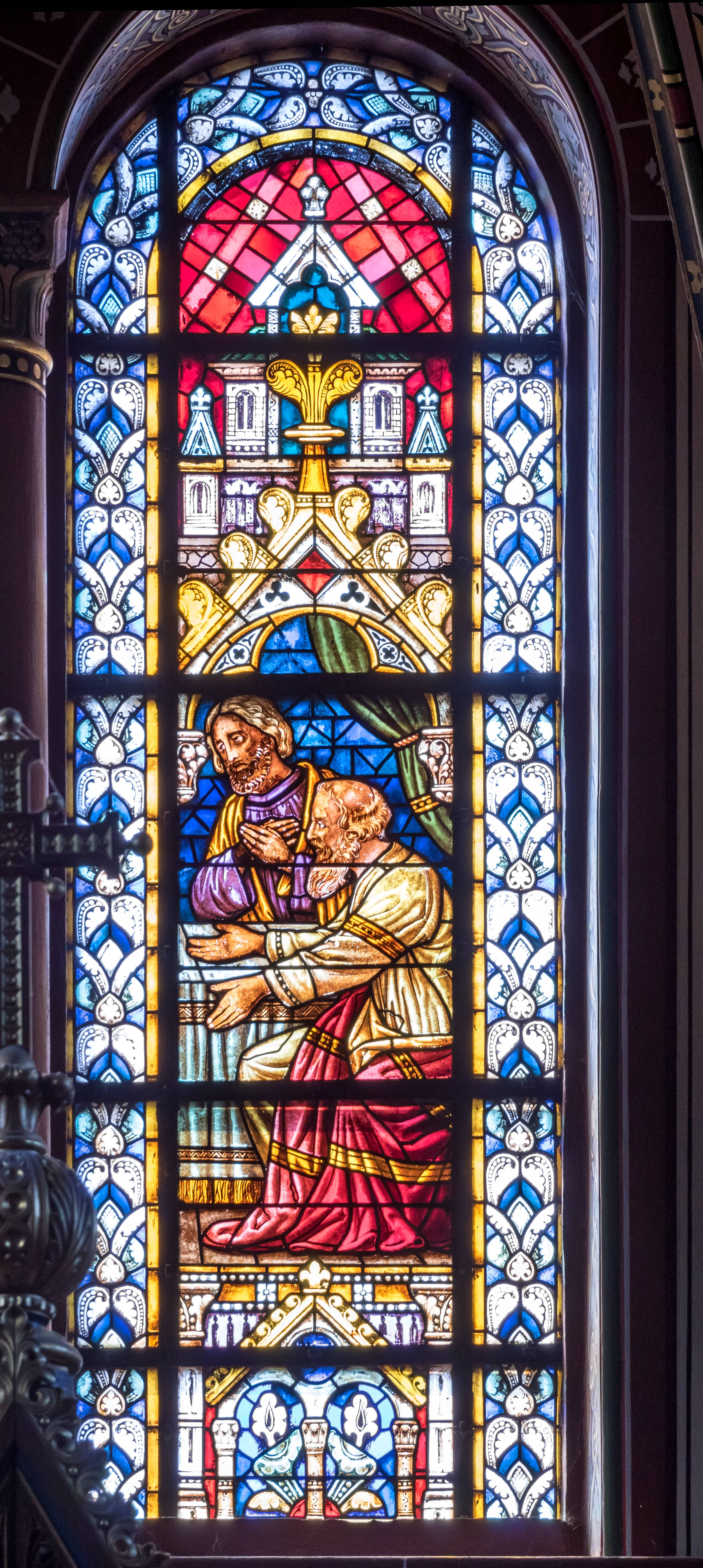 St. Peter und Paul in Bonndorf Die Glasfenster im Chor in der Kirche